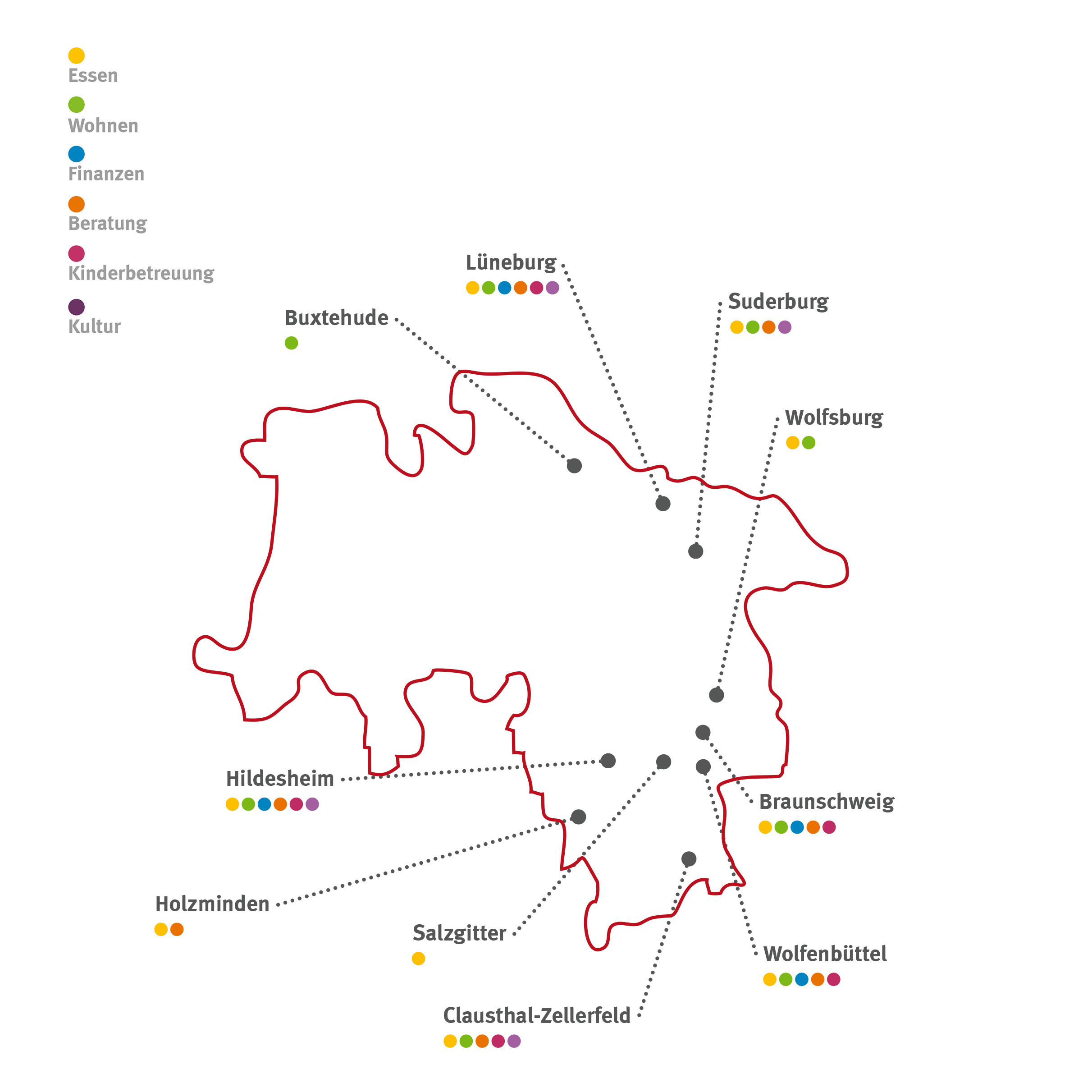 Auf dieser Karte sind alle Standorte und die Leistungen des Studentenwerks verzeichnet.